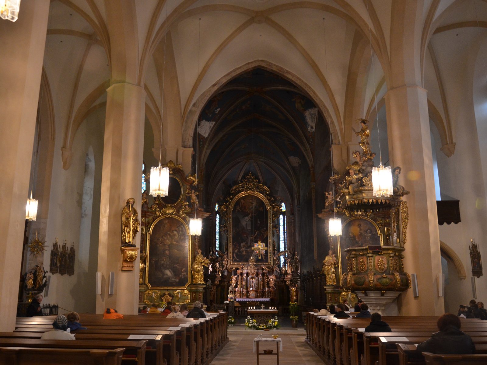 Pohled do hlavní lodi, Kostel svatého Jakuba Staršího, Jihlava